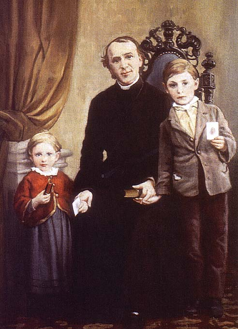 Portrait von Paul Josef Nardini